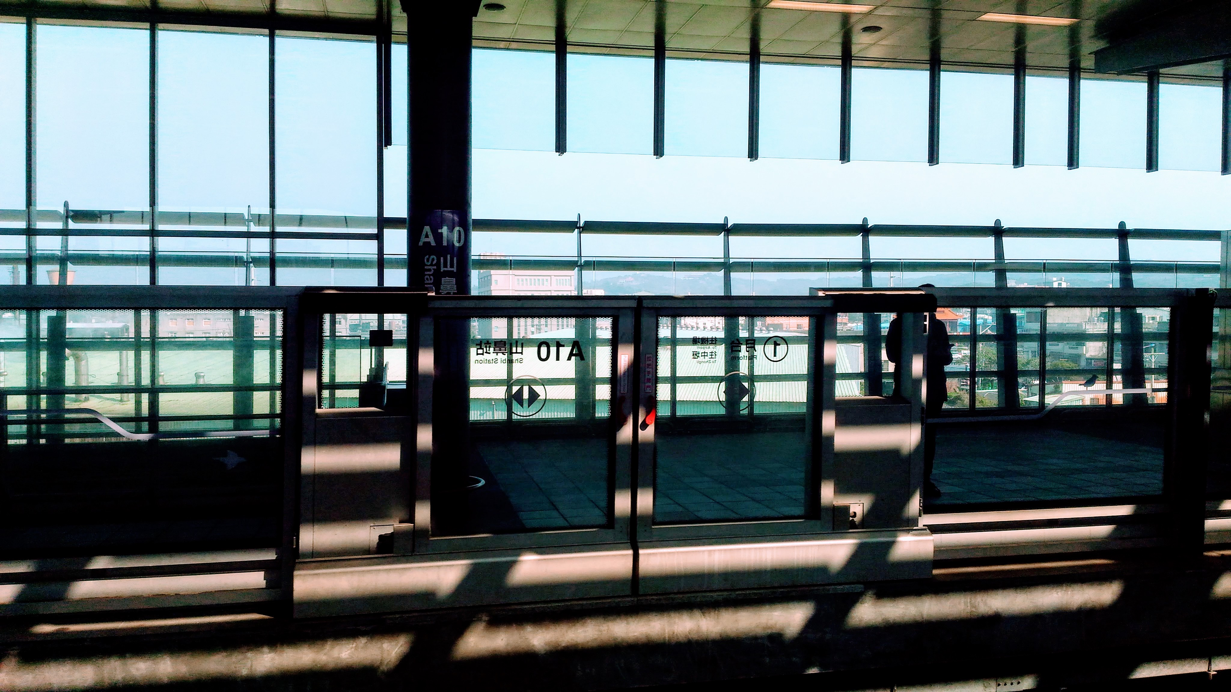 中文（台灣）: 桃園捷運山鼻站第一月台